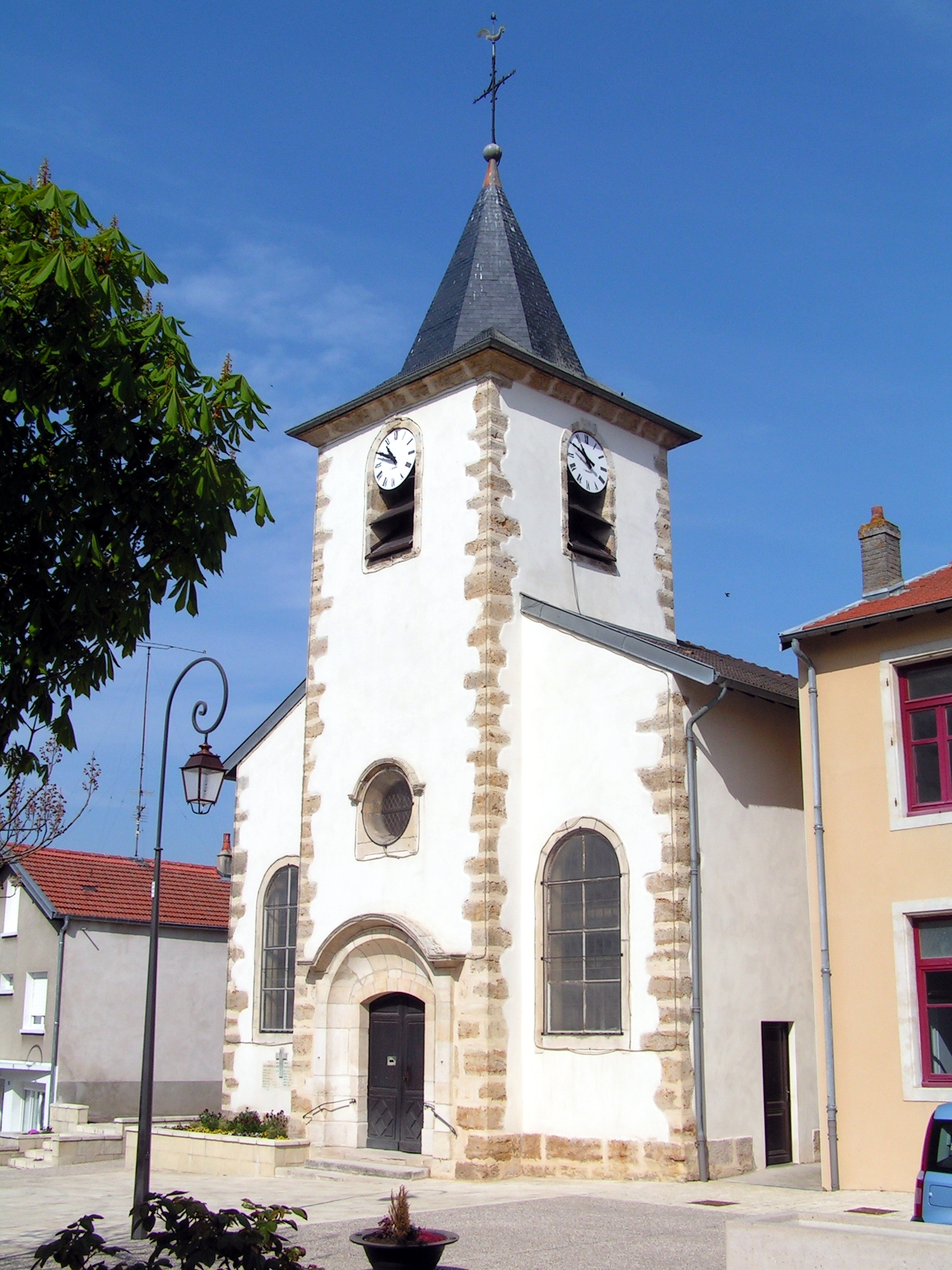 Église, Seichamps, Meurthe-et-Moselle, France